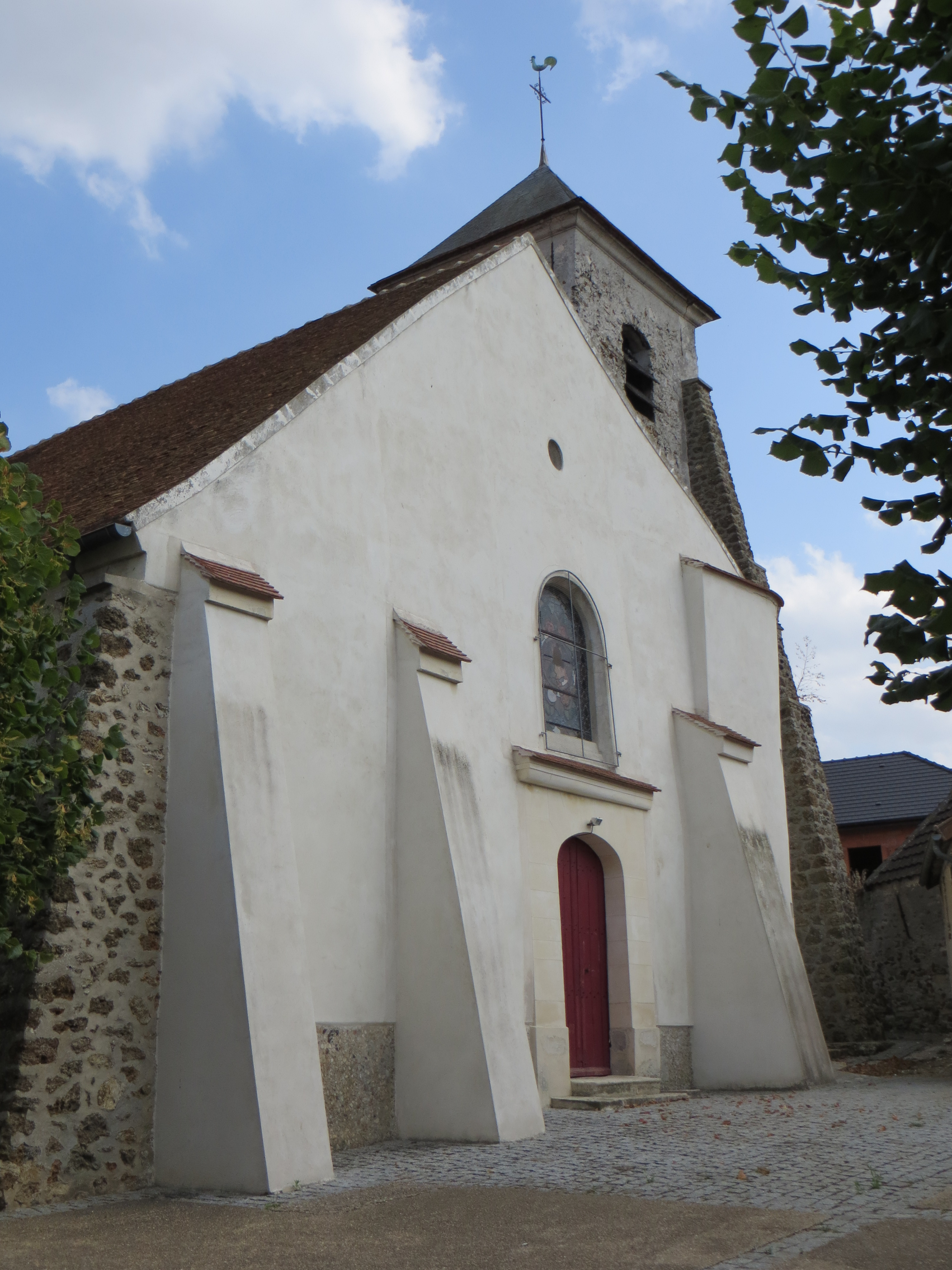 Vue de l'église